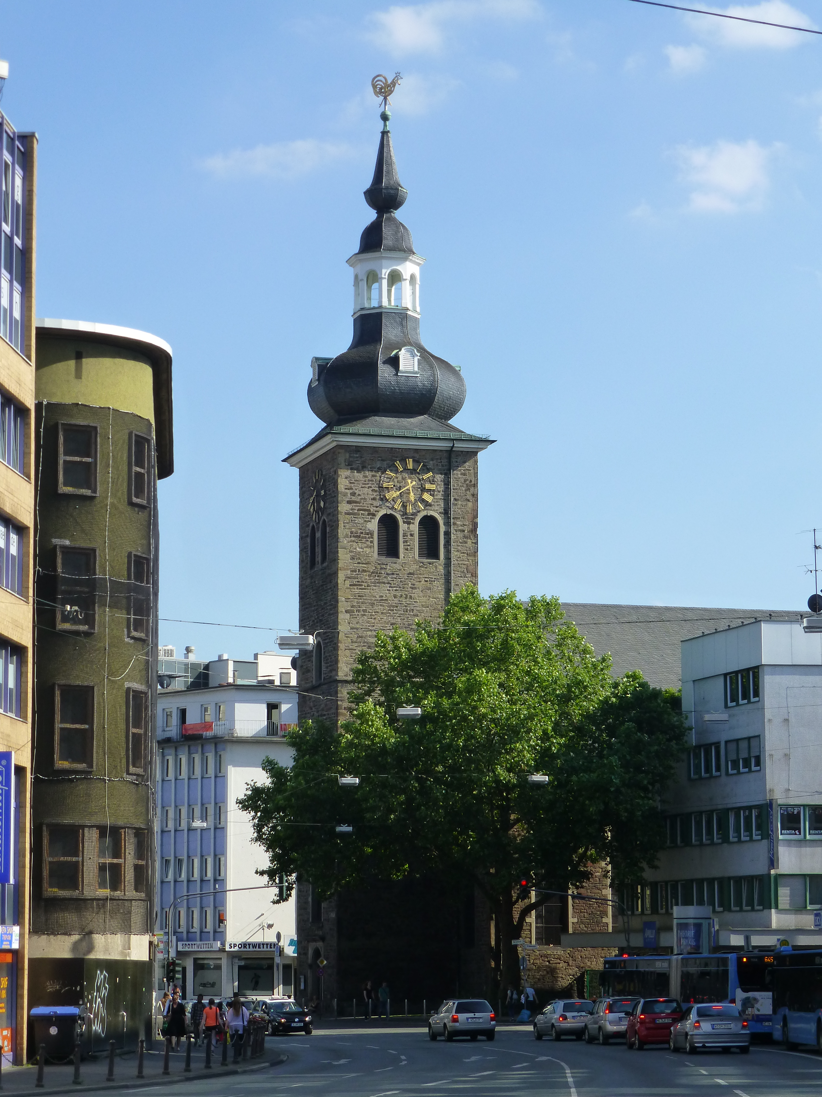 Morianstraße, Wuppertal